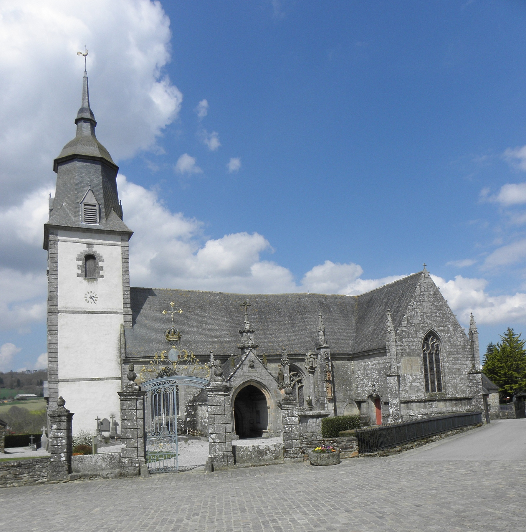 Église Notre-Dame de Délivrance du Quillio (22). Vue méridionale.